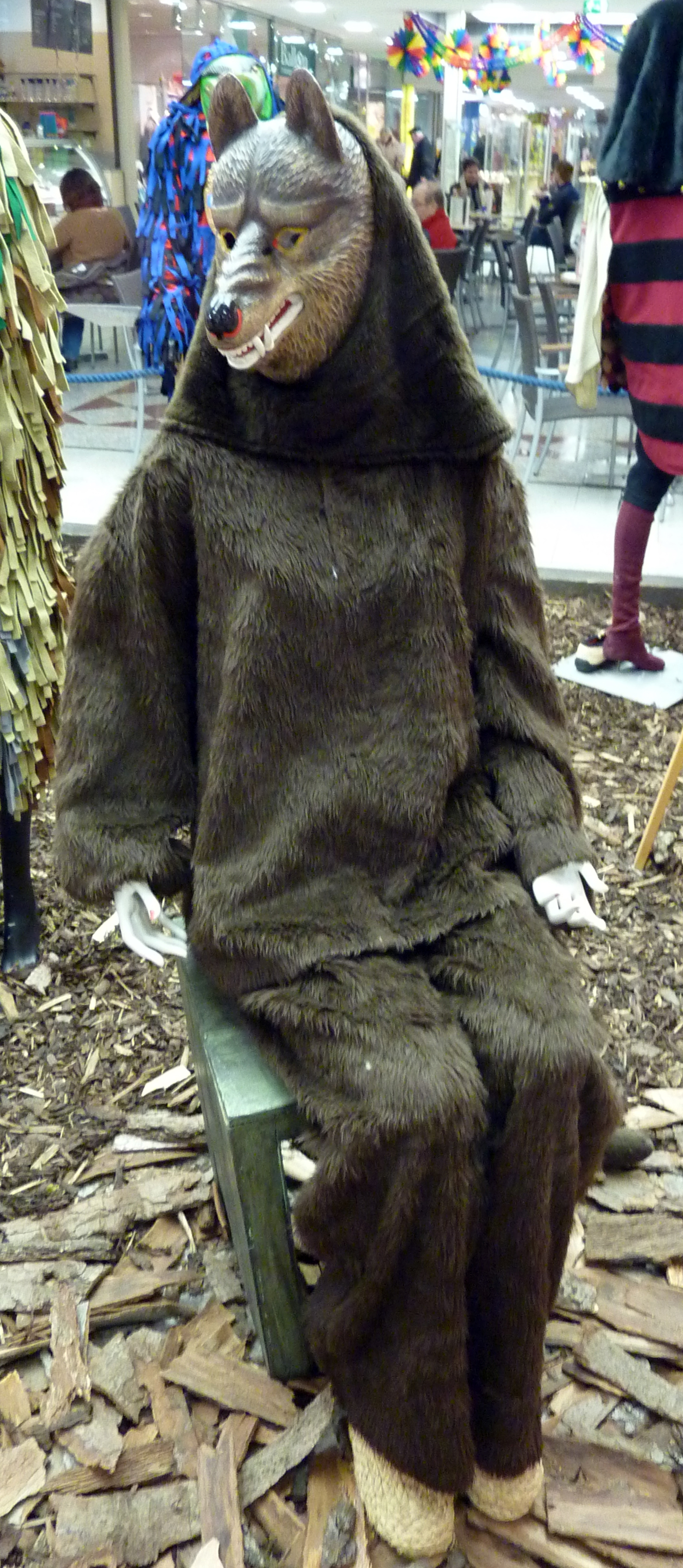 Wolf - Häsfigur des Narrenrats Wölfe Eckartsweier e.V. Exponat aus der Sammlung Peter Scharte aus der Ortenau, vom 14. Januar bis 13. Februar 2013 im Einkaufszentrum Schwarzwald City (Freiburg) unter dem Titel „Narrenrequisiten - vielfältig und kreativ“ ausgestellt.